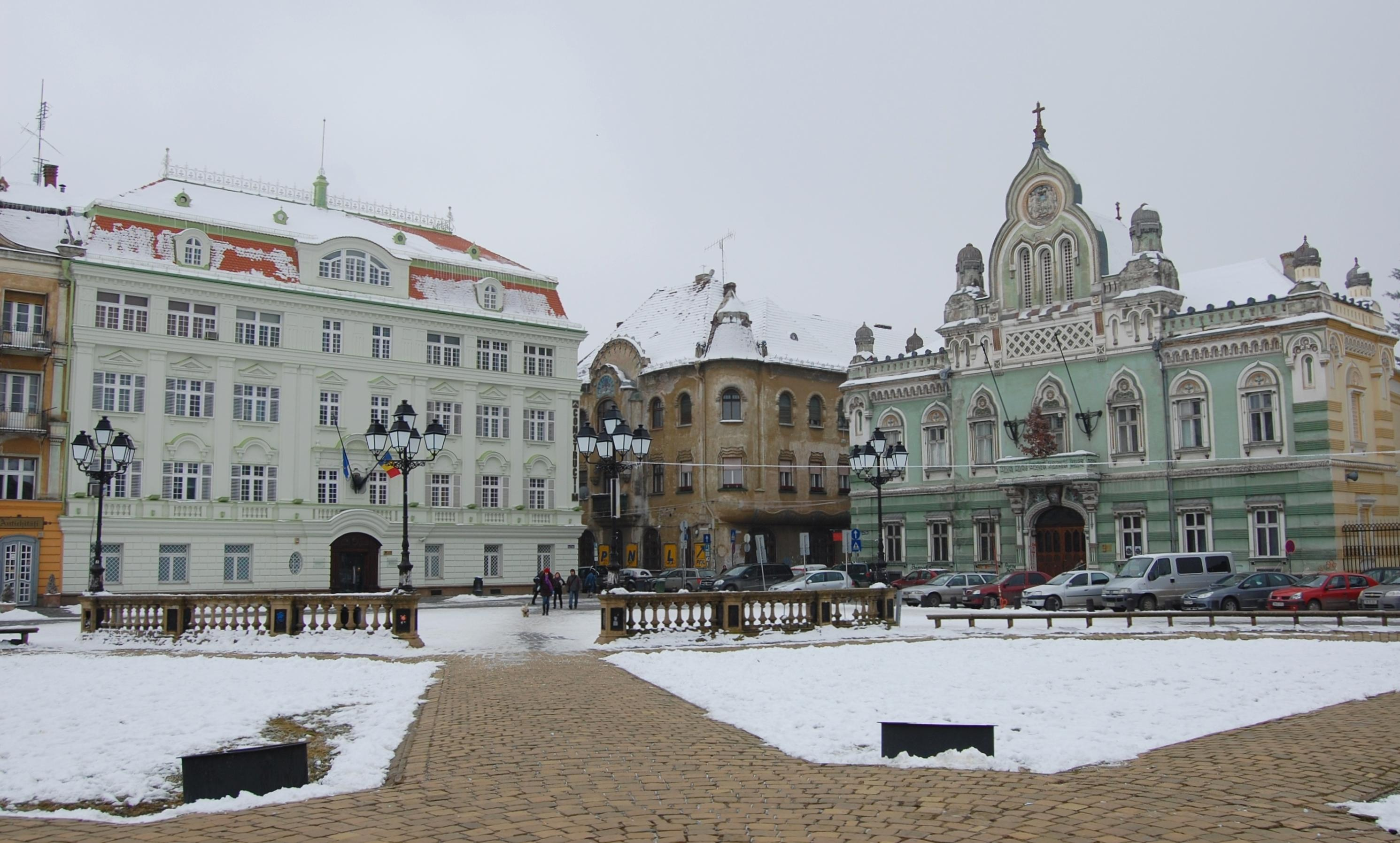 Temesvár - Losonczy tér (vagy Dóm tér)